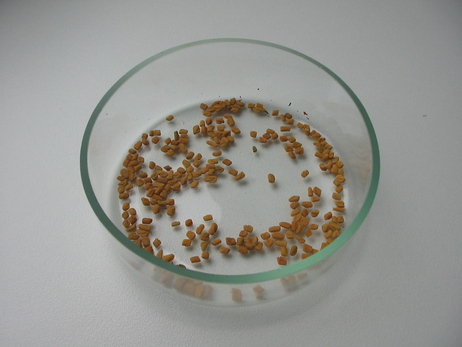 Насіння пажитника